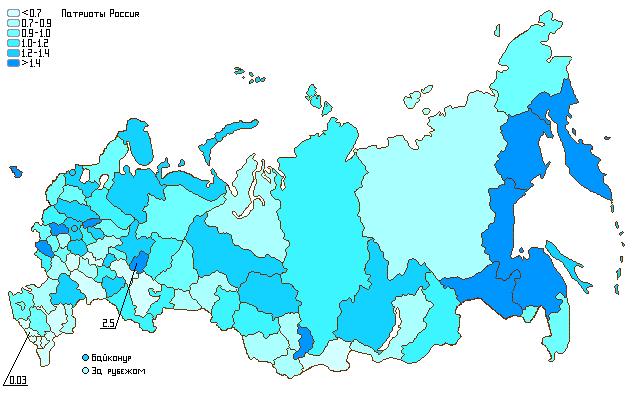 Результаты партии "Патриоты России" на парламентских выборах 2011 года